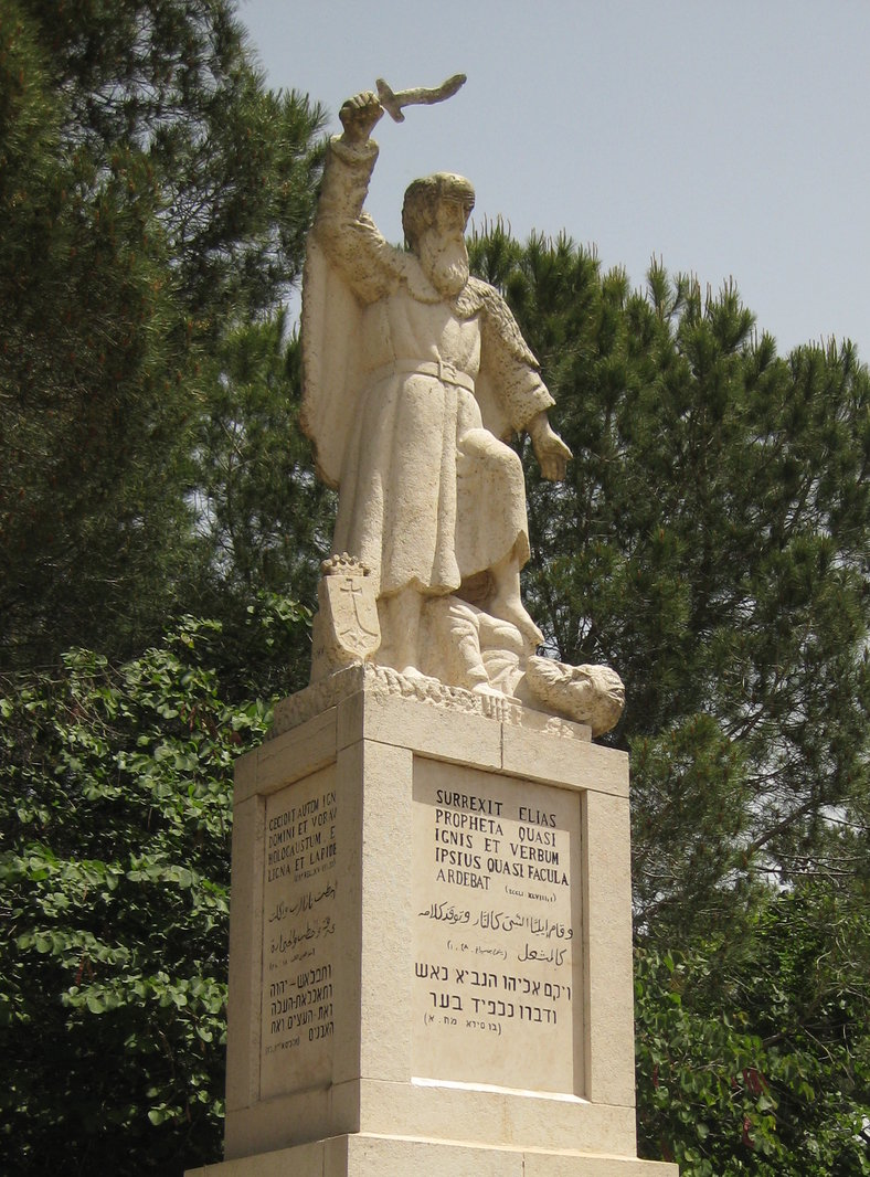 Kip sv. Ilije na brdu Karmelu